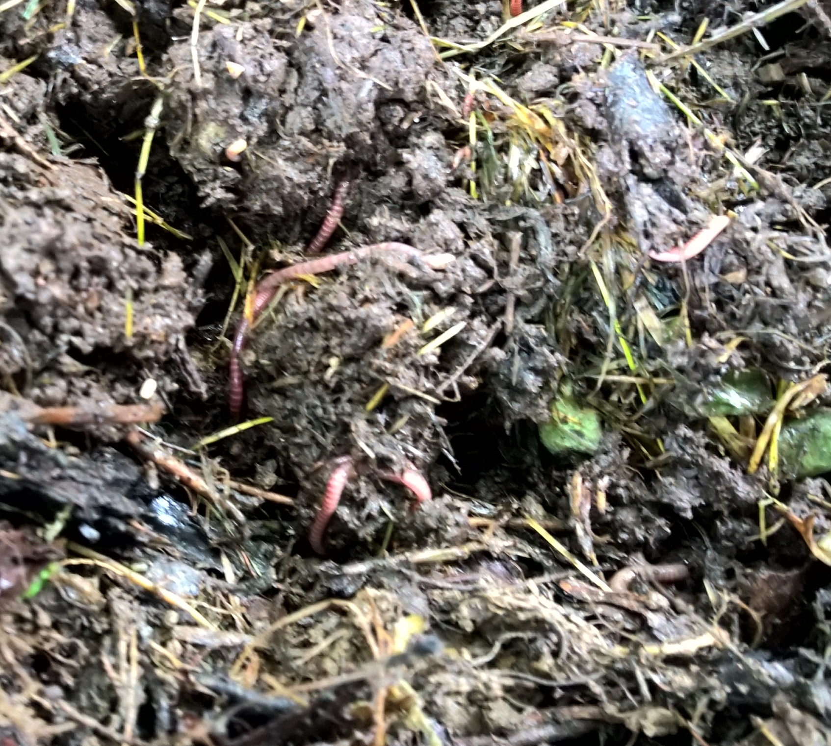 Vers rouges et fins - Longueur 5 à 10 cm, se multipliant dans un compostr